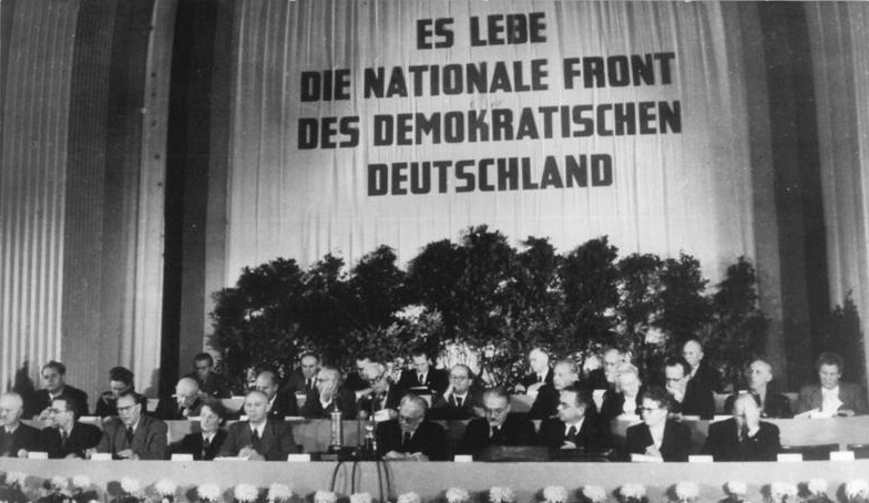 ADN-ZB/Igel 7.10.1949 Berlin: Gründung der Deutschen Demokratischen Republik am 7.10.49 Im Gebäude der DWK (Deutsche Wirtschaftskommission) in der Leipziger Straße fand am 7.10.1949 die 9. Tagung des Deutschen Volksrates statt, auf der das Manifest der Nationalen Front des demokratischen Deutschland verkündet wurde. Der Deutsche Volksrat konstituierte sich zur Provisorischen Volkskammer der Deutschen Demokratischen Republik. Im Präsidium: 1. Reihe v.l.n.r.: Prof. Dr. Johannes Stroux, Wilhelm Koenen, Otto Grotewohl, Dr. Magdalena Stark-Wintersig, Ernst Goldenbaum, Wilhelm Pieck, Otto Nuschke, Dr. Lothar Bolz, Wilhelmine Schirmer-Pröscher, Walter Ulbricht. 2. Reihe v.l.n.r.: Paul Merker, Friedel Malter, Prof. Eberhard Hübner, Bernhard Göring, Prof. Dr. Theodor Brugsch, Prof. Walter Friedrich, Friedrich Ebert, Herbert Warnke, Käthe Kern, Vincenz Müller, Prof. Hans Reingruber, Elli Schmidt. 3. Reihe Mitte: Erich Honecker.